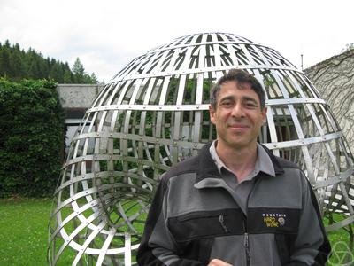 Foto di Viktor Ginzburg